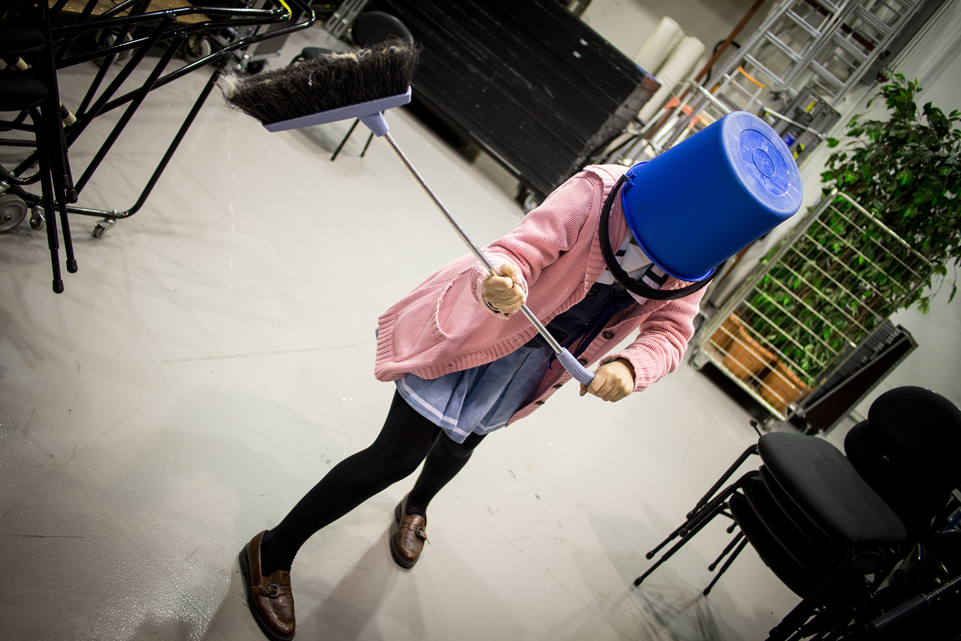 20140118190441IMG_5688_M